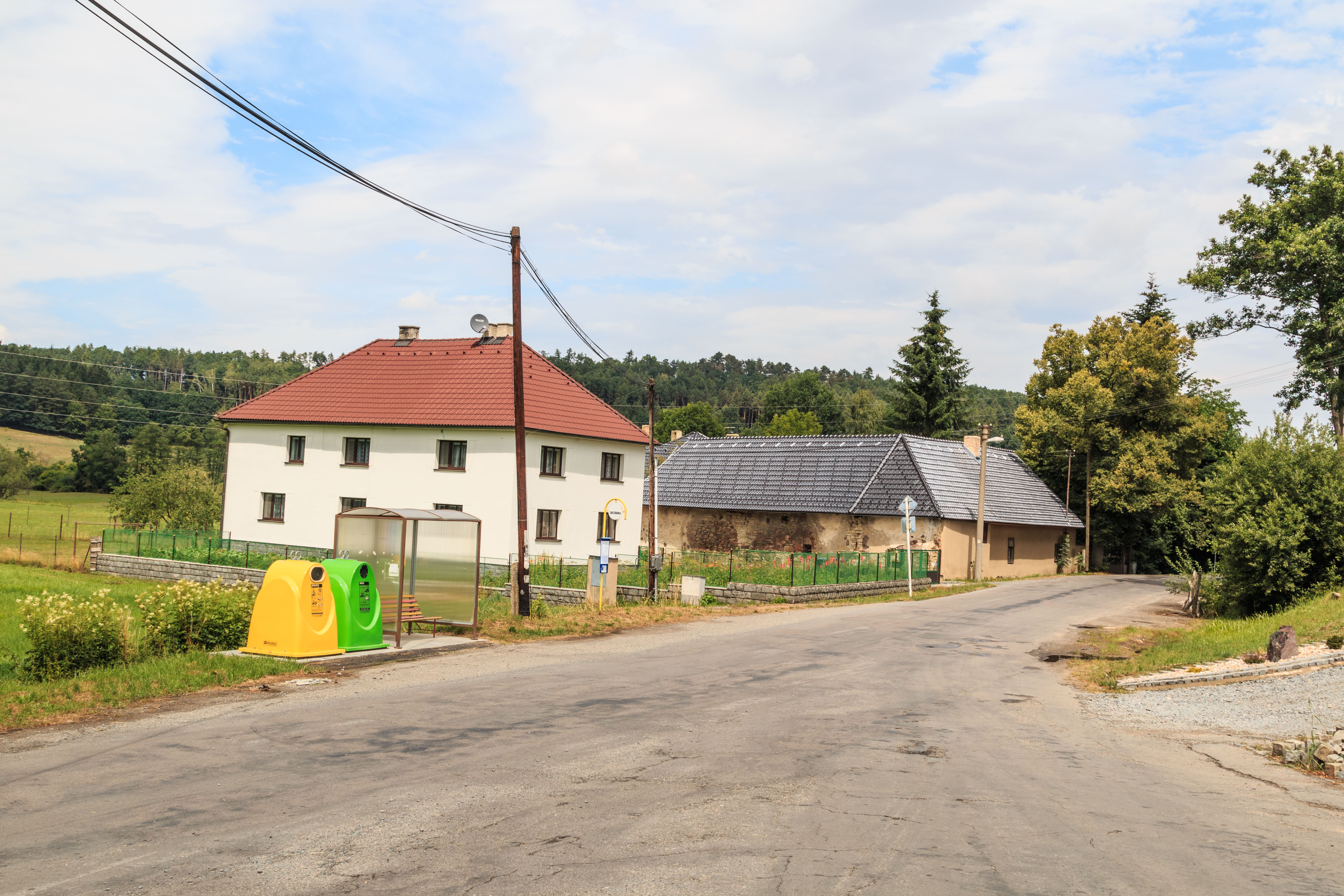 Leštinka čp. 5